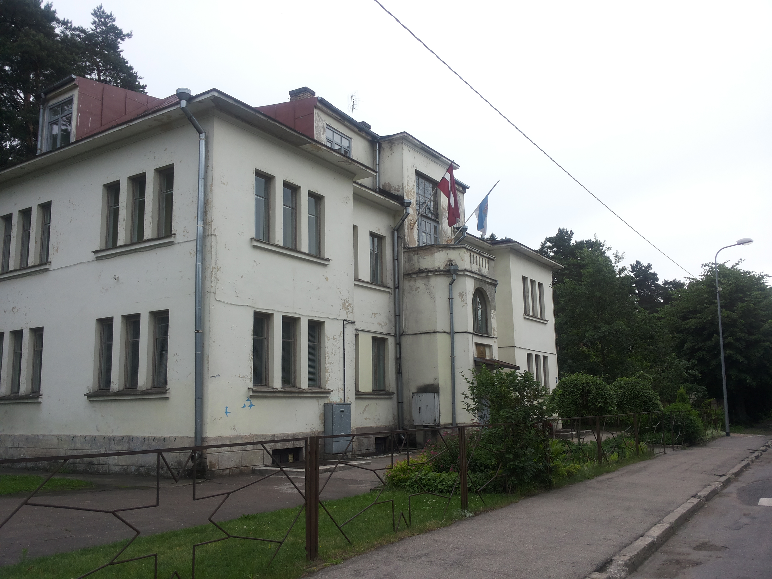 Savrupmāja, Rīga, Lībekas iela 27